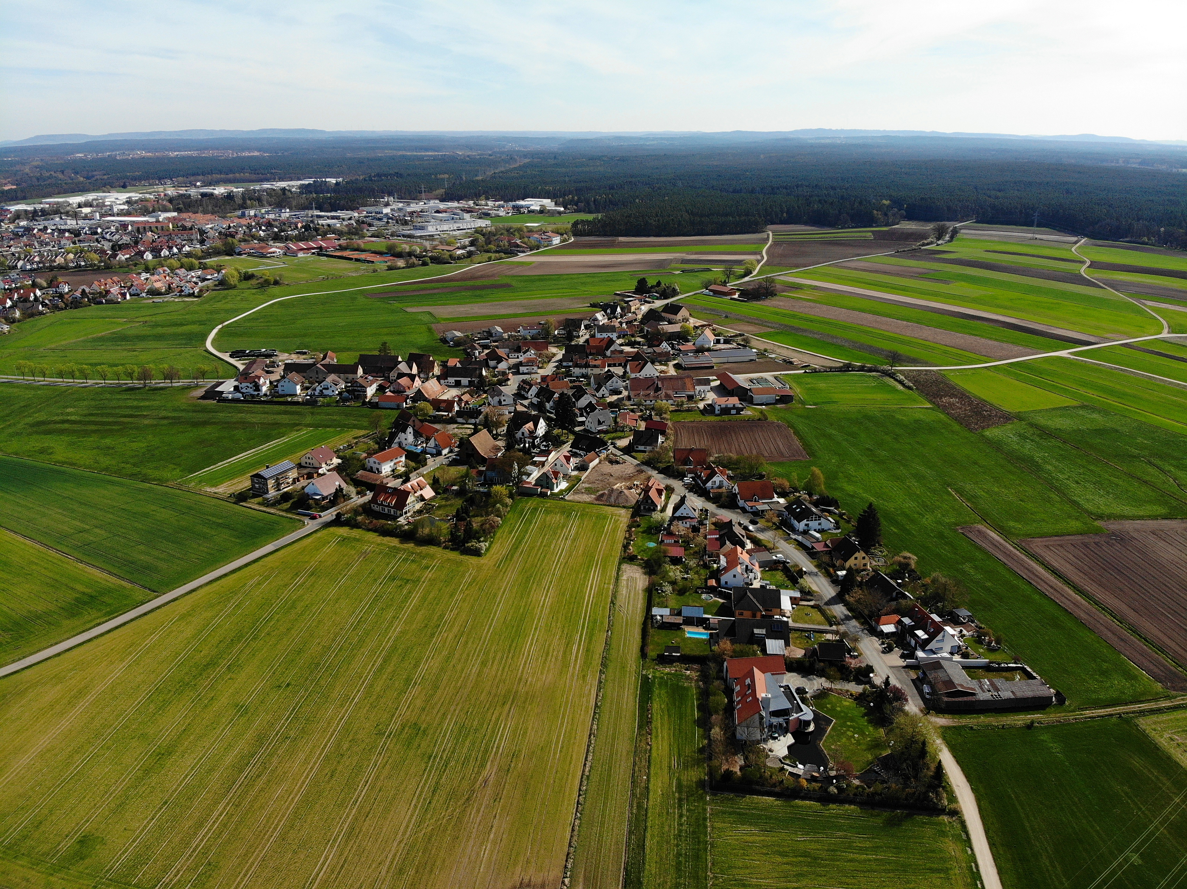 Raubersried (Wendelstein) Luftaufnahme (2020)